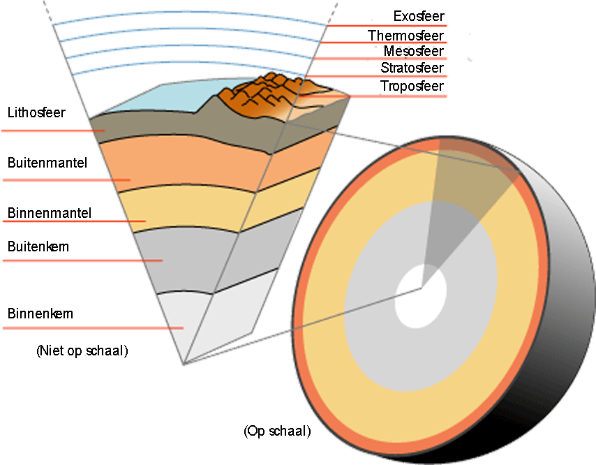 Doorsnede van de Aarde met namen in het Nederlands